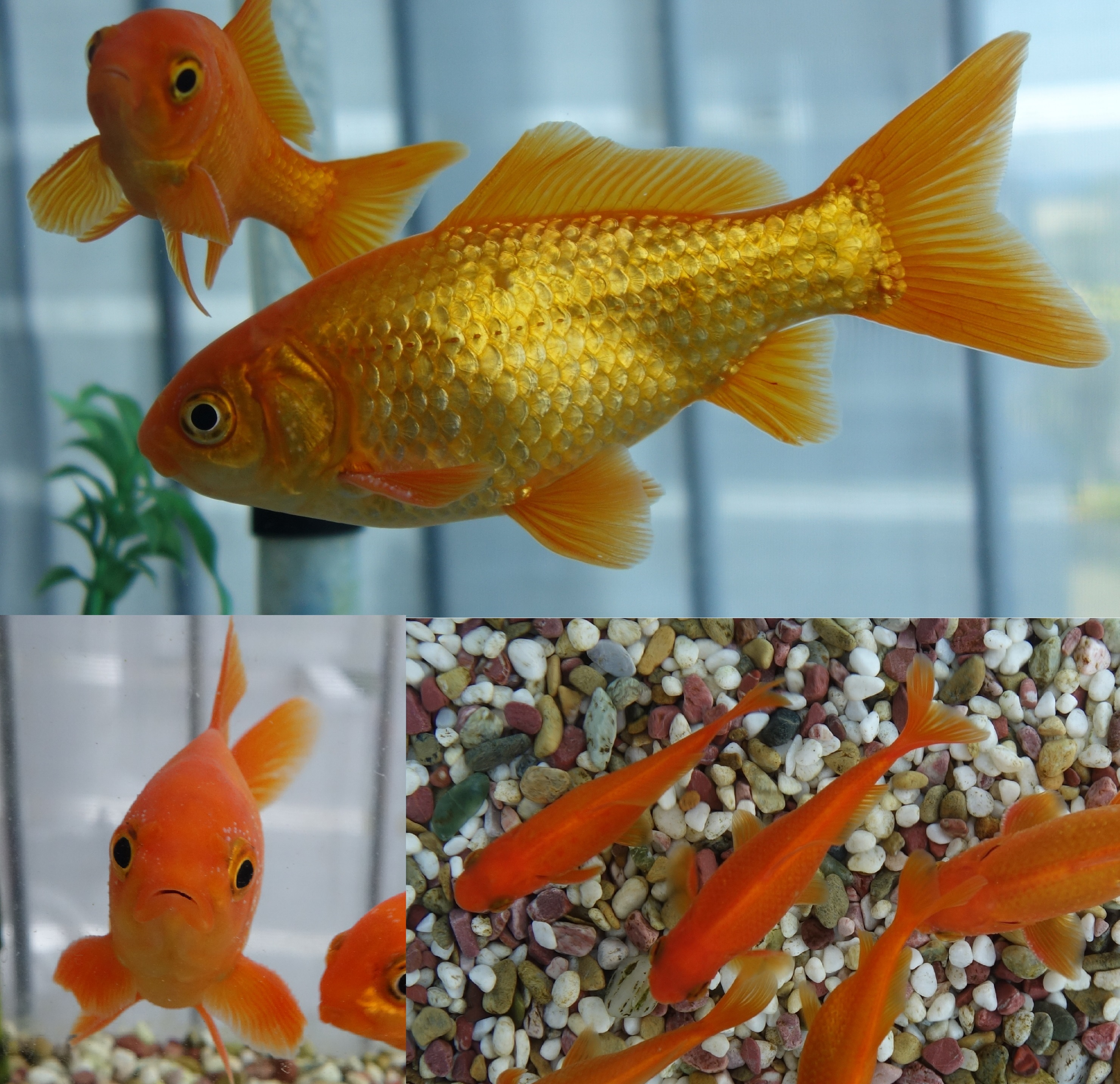 ワキン 三面図